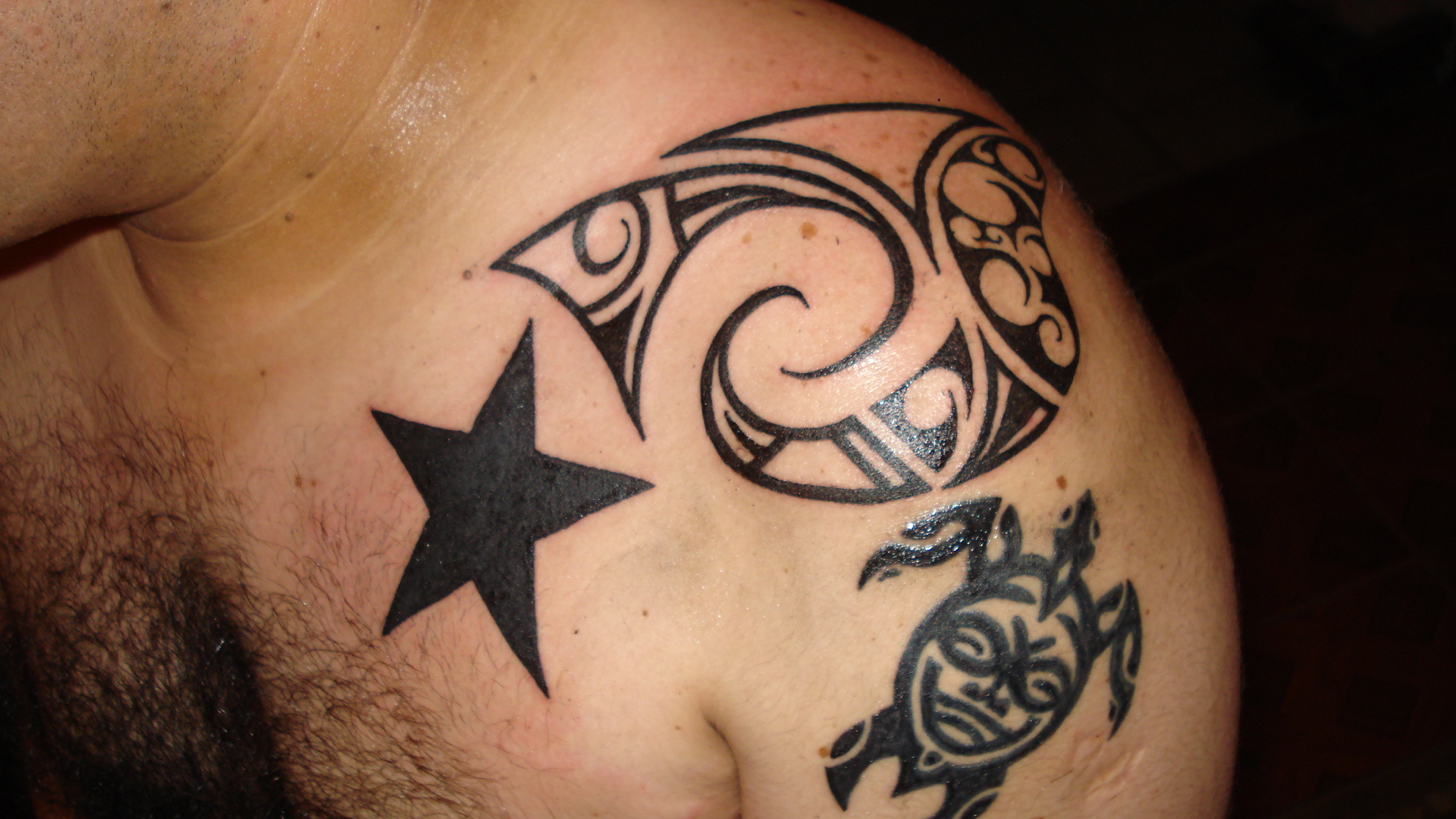 Tatuaje que mezcla el estilo Maori con Tribal (La tortuga es característica de tribus polinesicas como la Pascuense)